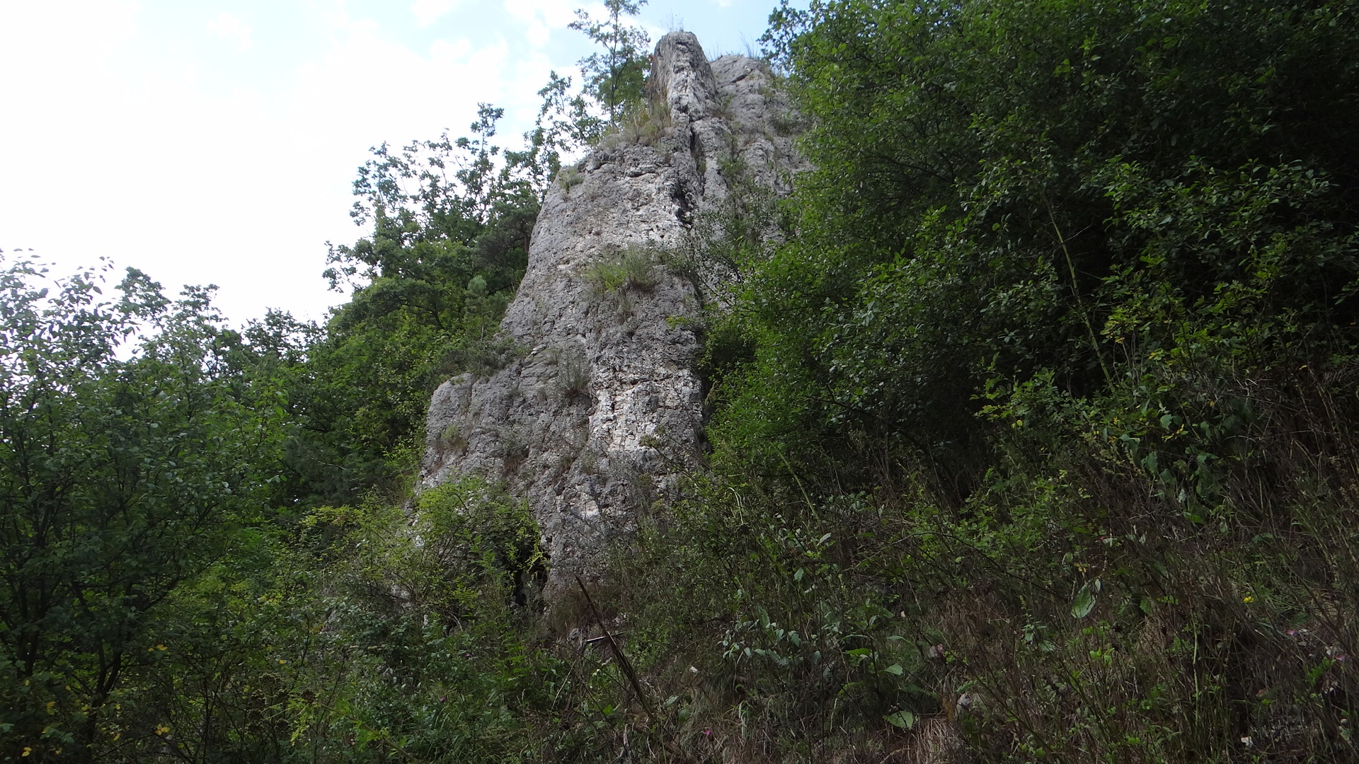 Schronisko Pierwsze w Wąwozie Ostryszni w Imbramowicach